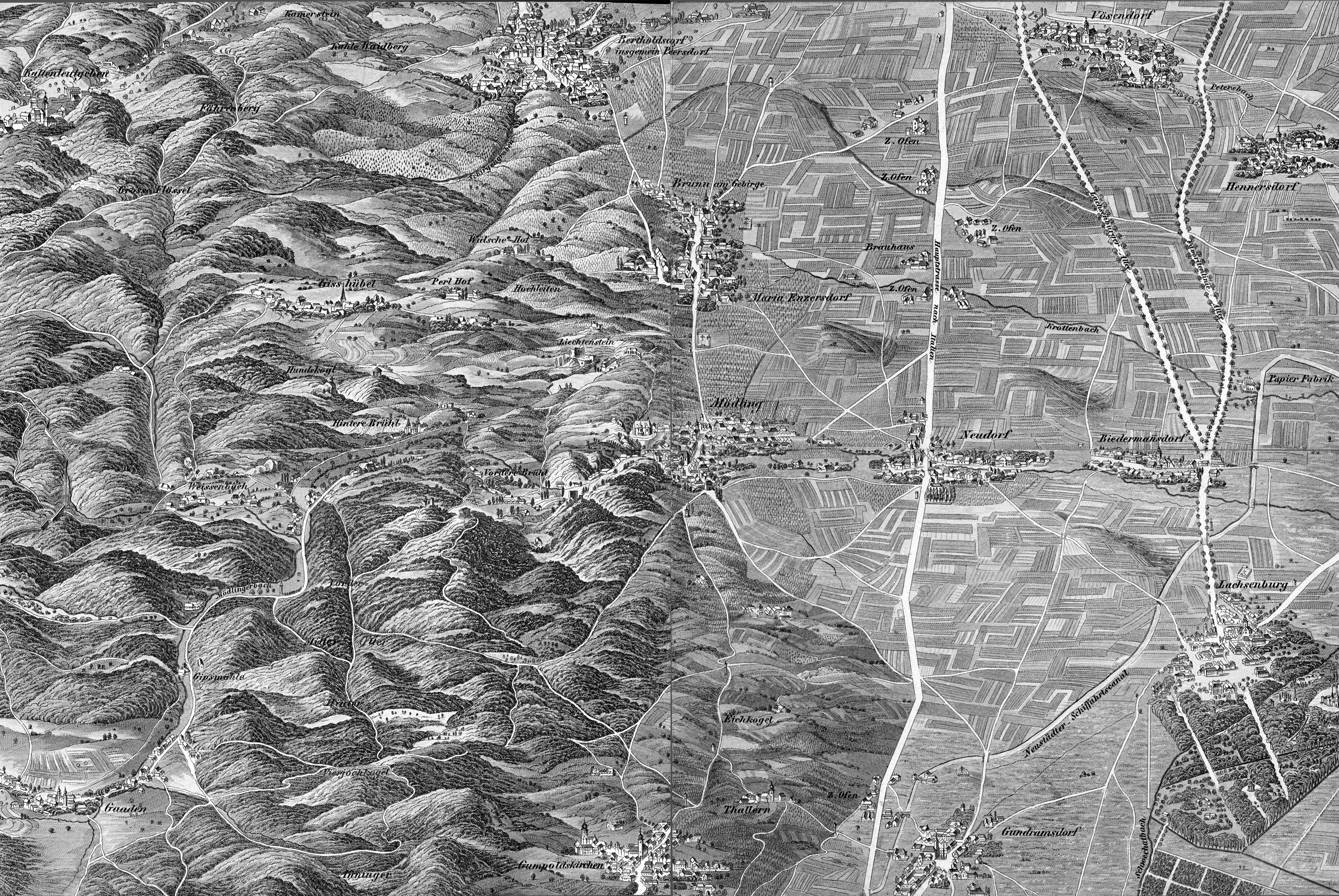 Südliche Umgegend mit Mödling und Lachsenburg im VUWW (vietel Unter dem Wiener Wald) - Schweikhardt 1837 - Sektion 8